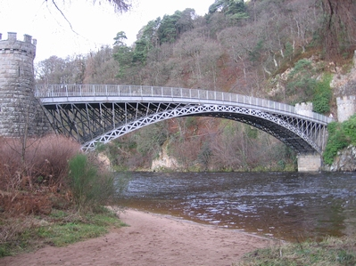 craigellachie bridge side on